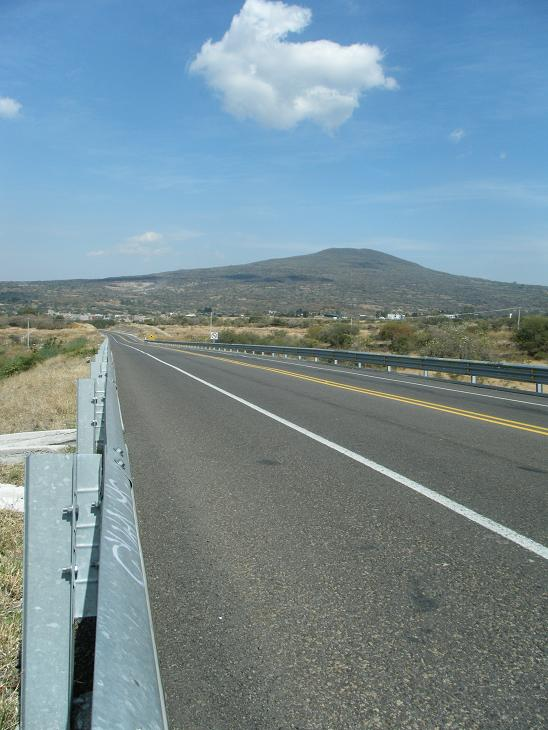 Autopista Morelia Salamanca a la altura de Uriangato